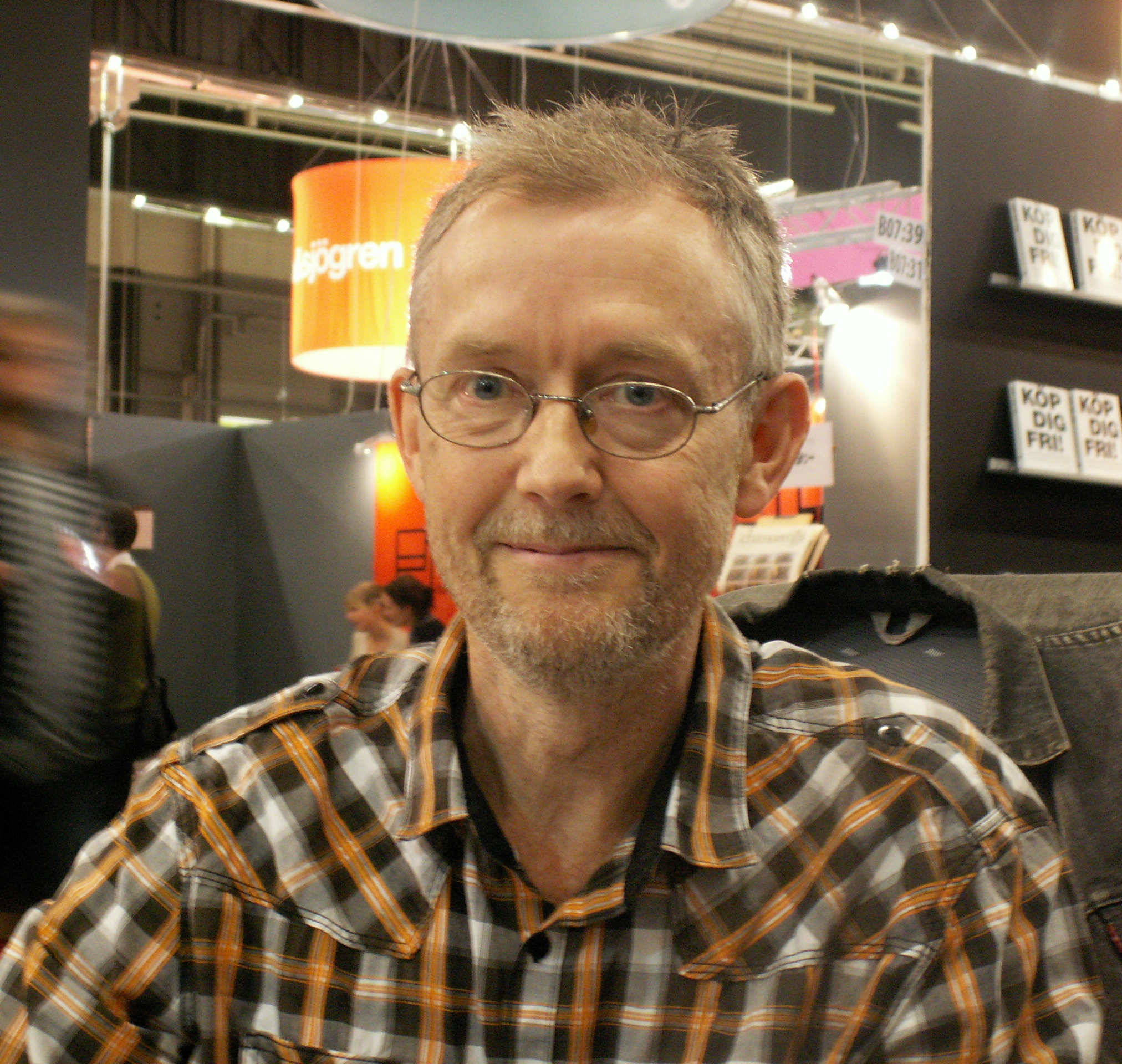 Robert Nyberg, serieskapare och illustratör